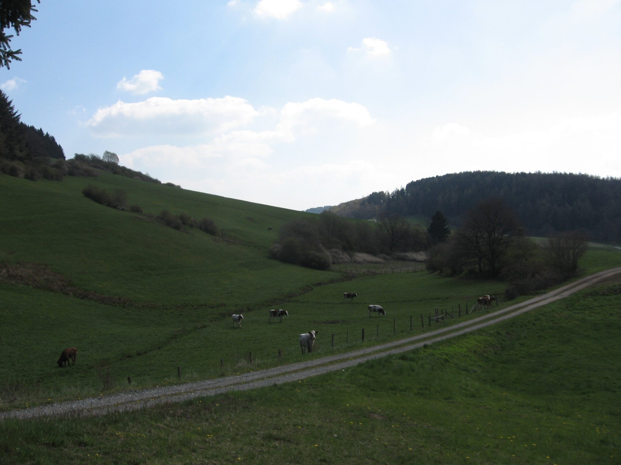 Naturschutzgebiet Katmecketal mit Bach Katmecke in Bildmitte. Links Bereich des Hangs des Kuhlenberges. Waldbereiche links und rechts gehören nicht zum NSG.